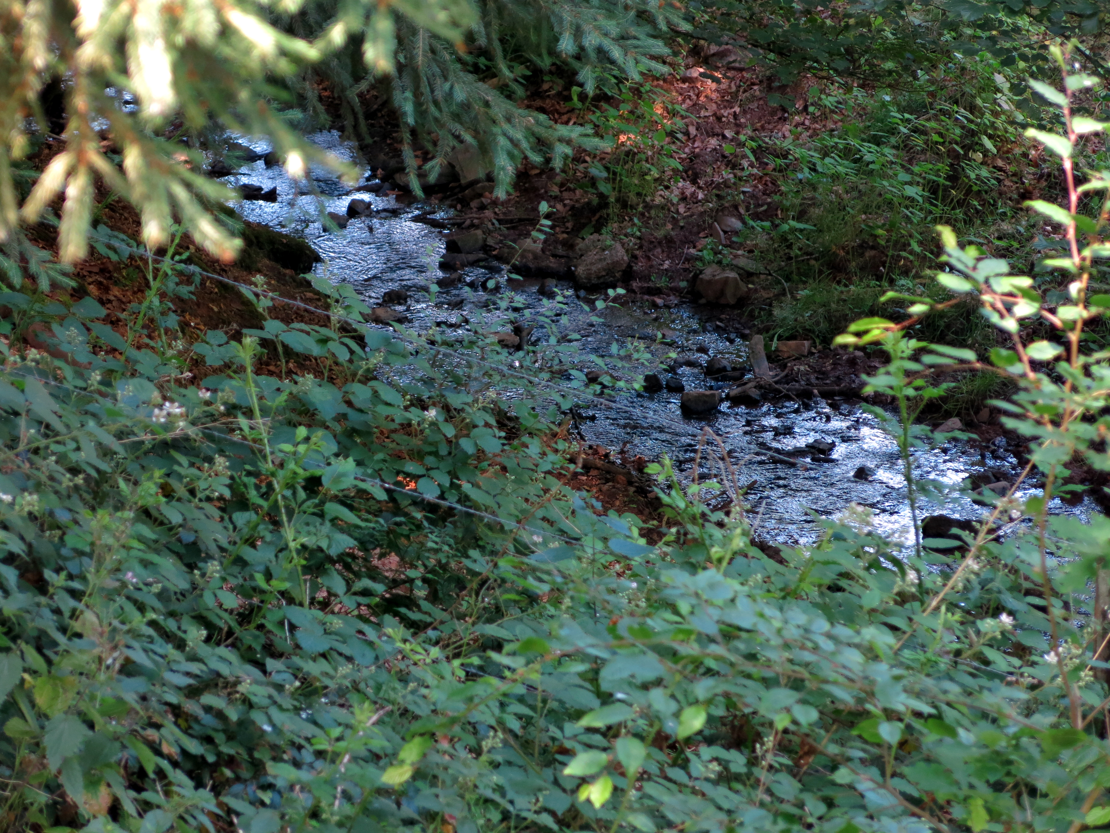 D'Mechelbaach, do wou se de Fëschweier verléisst.